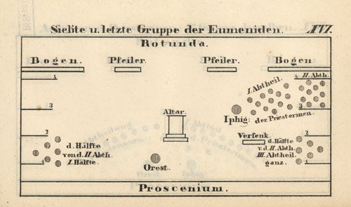 Inszenierungsplan einer „Gruppe“ aus: Franz von Akáts, genannt Grüner: Kunst der Scenik in ästhetischer und ökonomischer Hinsicht theoretisch, praktisch und mit Plänen, wie auch als Beispiel des Verfahrens durch eine ganz scenirte Oper "Iphigenia in Tauris" erläutert. Als Handbuch für Intendanten, Privat-Direktoren, Kompositeure, Kapellmeister, Regisseure (...). Wien, Mausberger, 1841